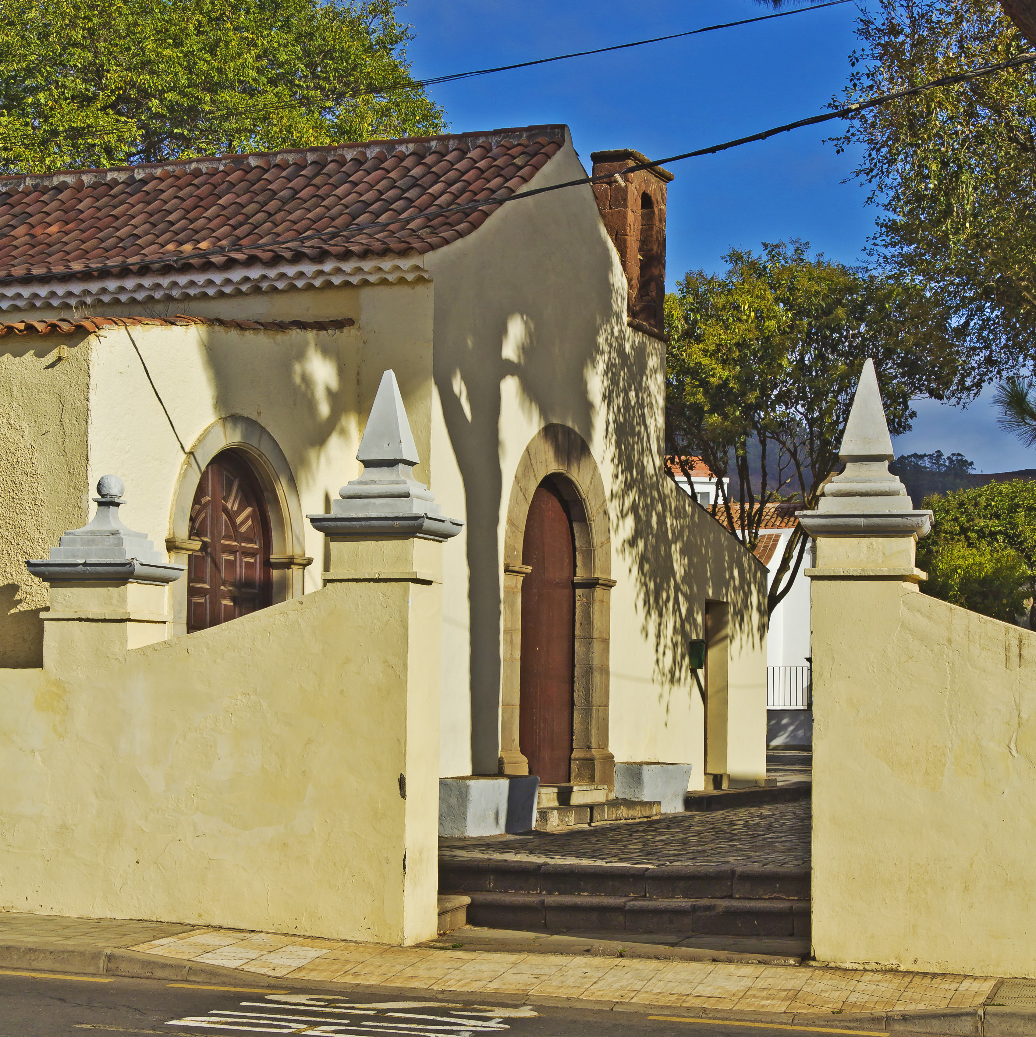 Die Baugeschichte der Kirche San Lázaro in La Laguna (Teneriffa) geht auf den Beginn des 16. Jahrhunderts zurück.